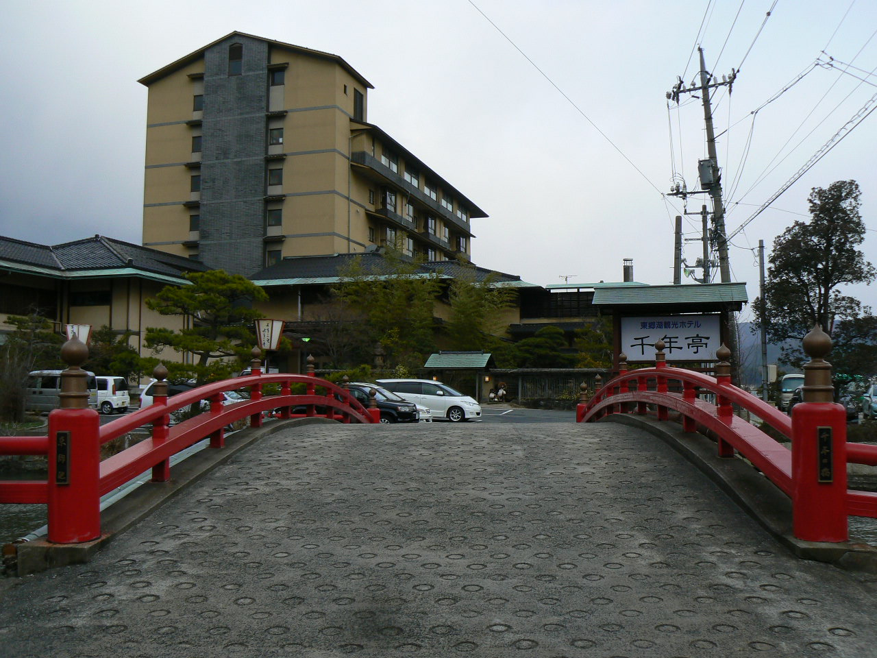 はわい温泉「千年亭」